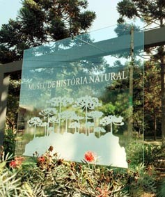 Museu de História Natural de Curitiba - Painel na entrada